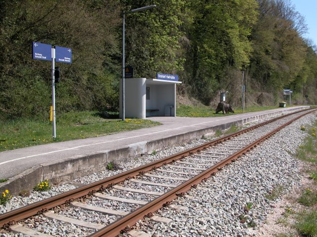 Haltepunkt Rebdorf